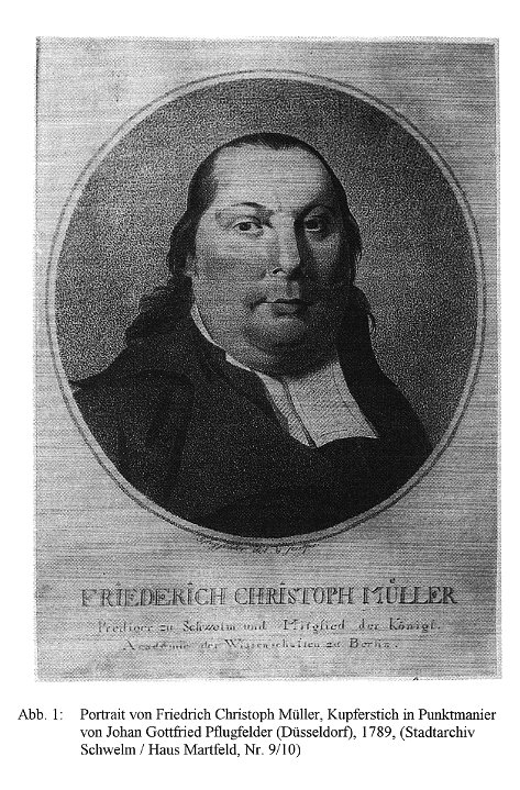 Kupferstich, Poträt von Friedrich Christoph Müller, Pfarrer in Schwelm